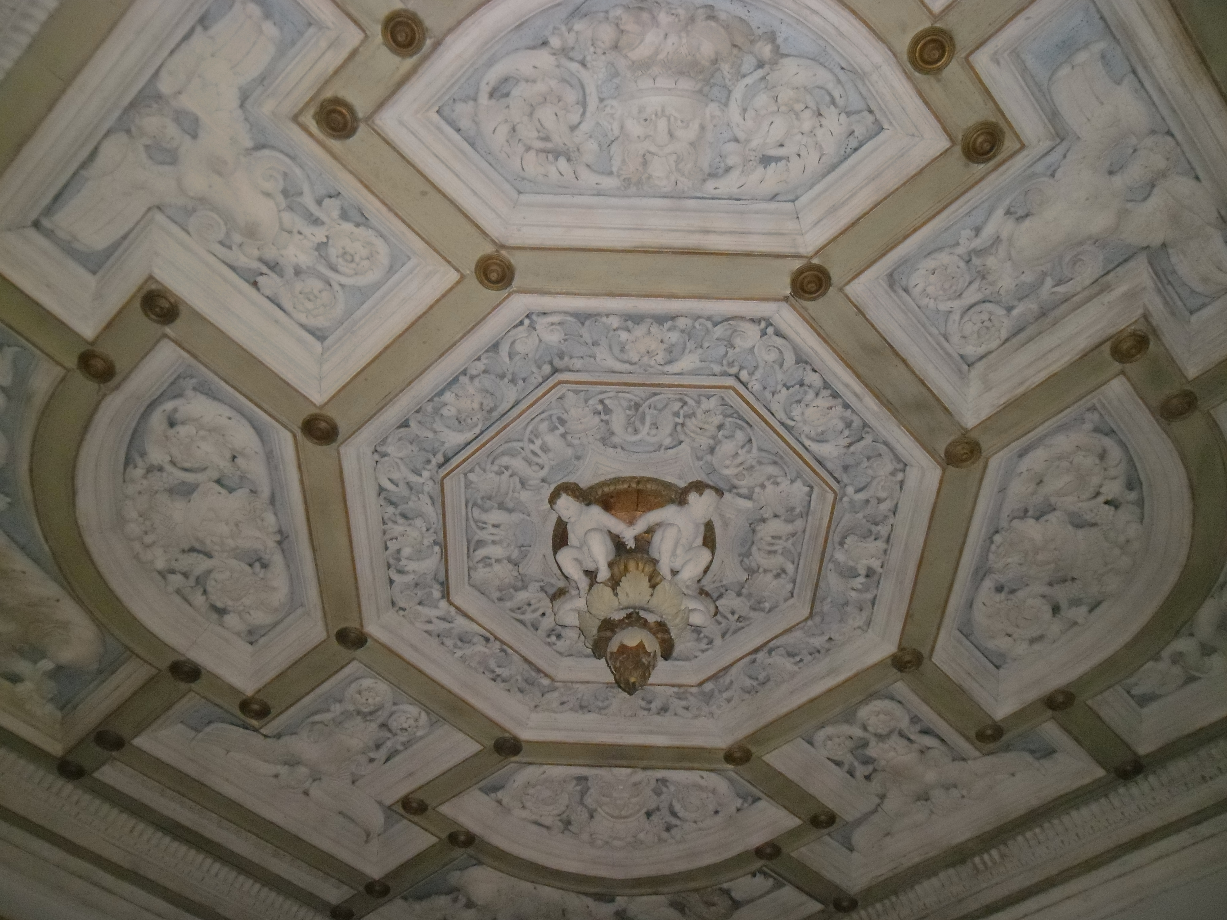 Museo archeologico nazionale delle Marche